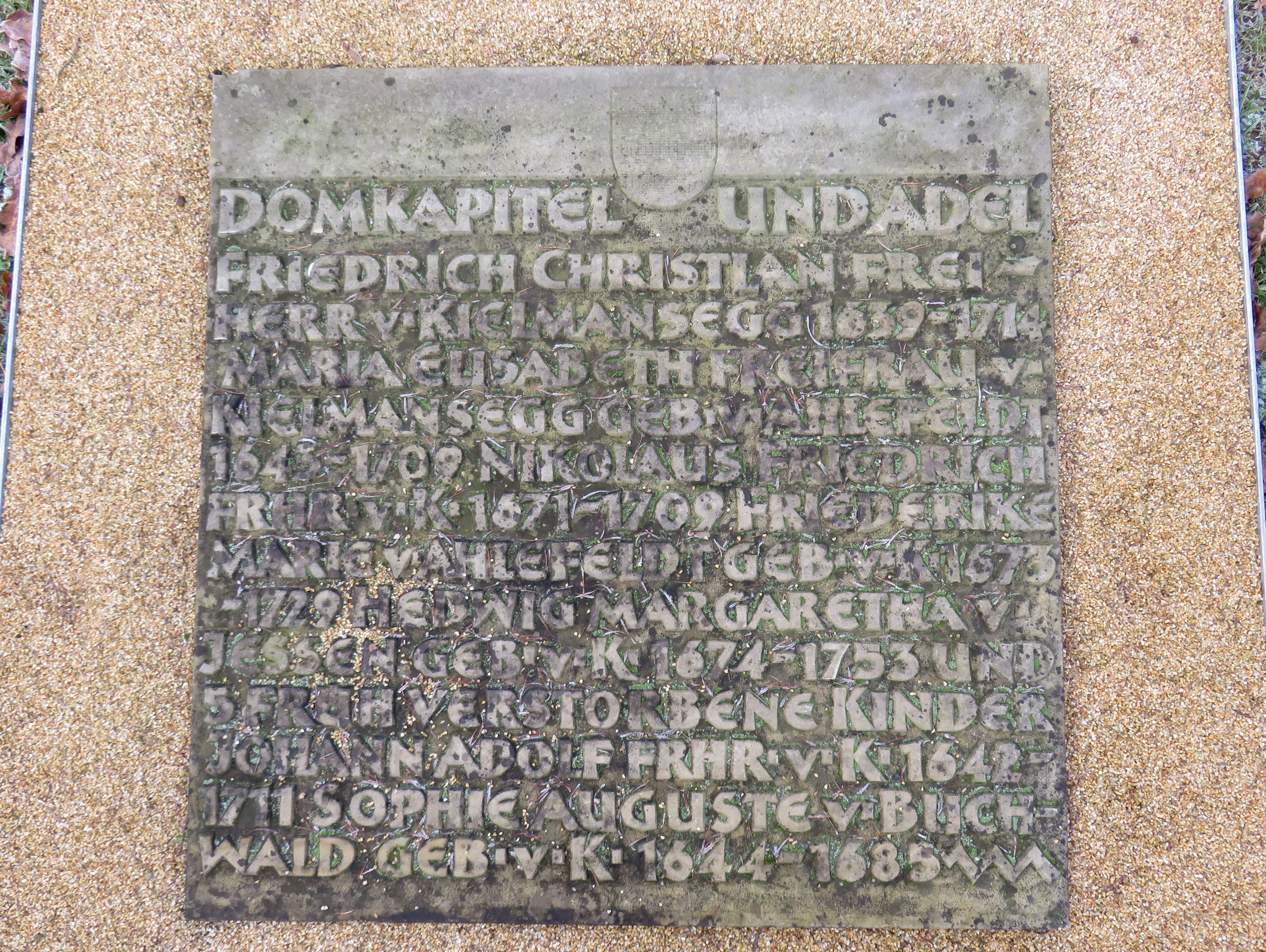 Sammelgrab DomkapitelAdel im Bereich des Althamburgischen Gedächtnisfriedhofs auf dem Hamburger Friedhof Ohlsdorf zu Ehren von unter anderen Friedrich Christian Kielman von Kielmansegg (mit Ehefrau Maria Elisabeth und einigen Kindern), Johann Adolph von Kielmansegg (Domherr).